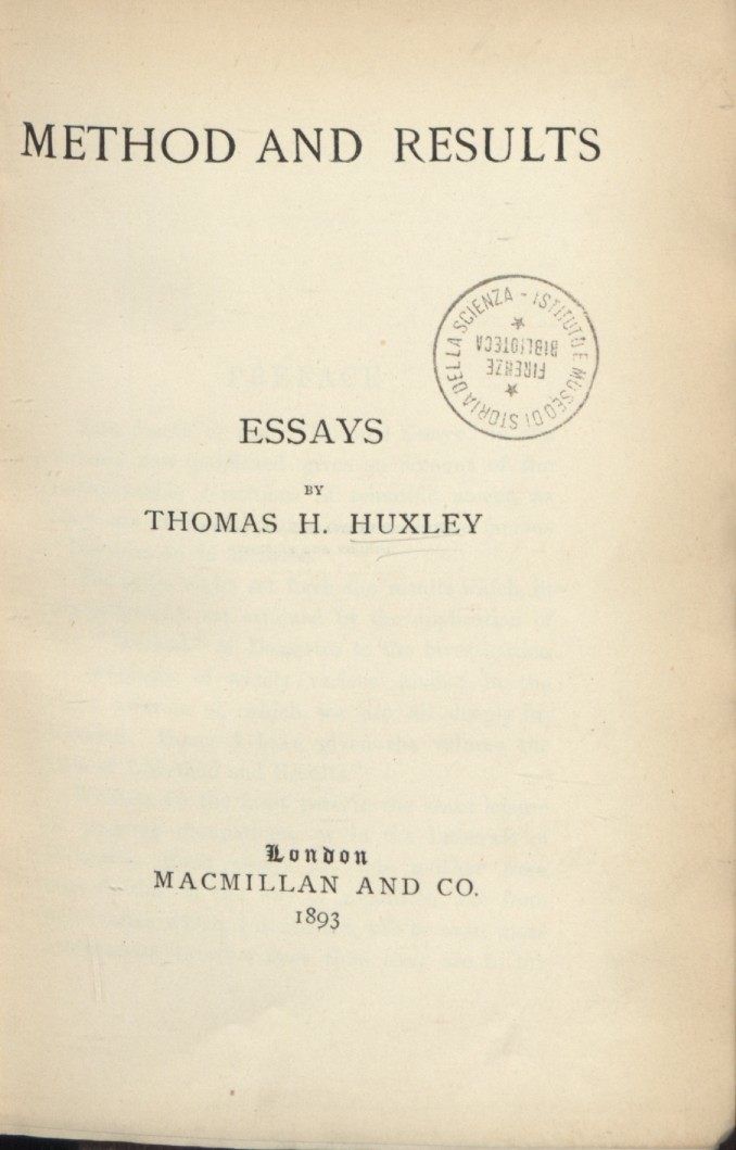 1: Method and results : essays / by Thomas H. Huxley. - London : Macmillan and Co., 1893. - viii, 430 p. ; 19 cm. Frontespizio